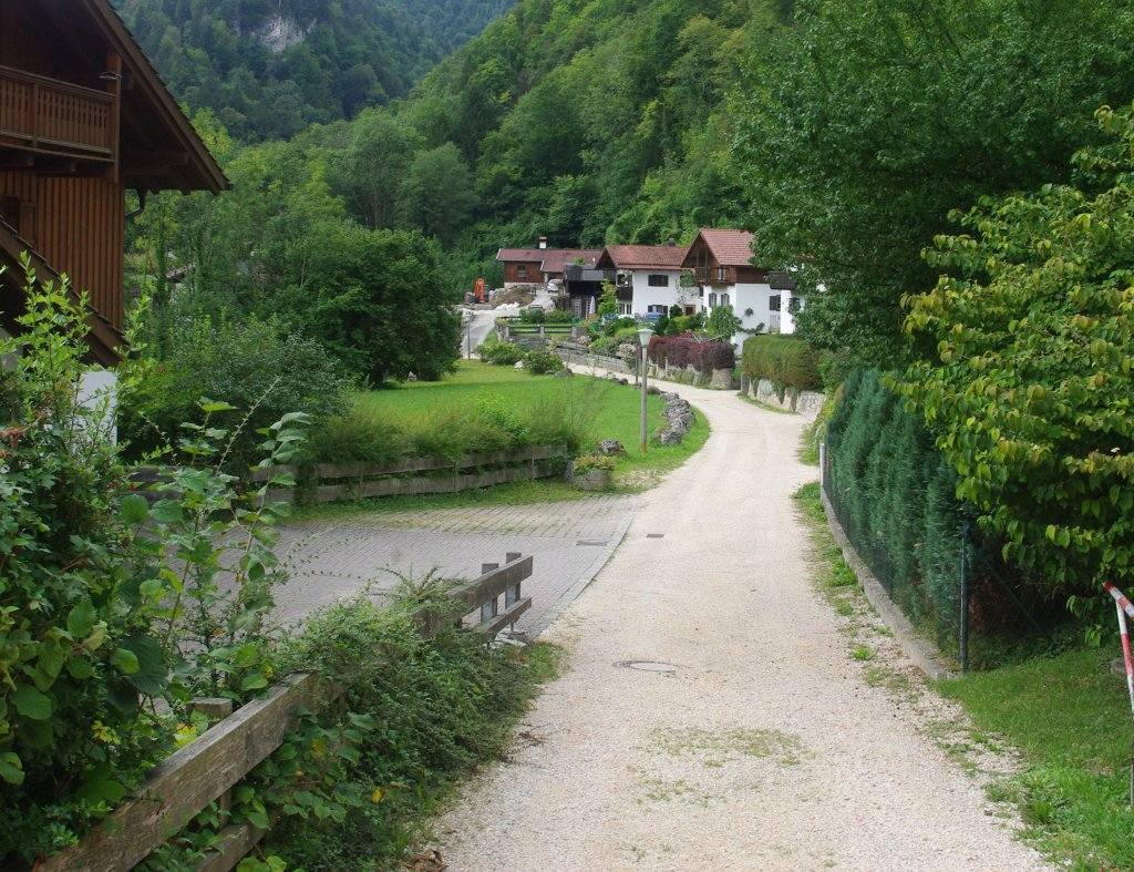 Moserweg in Bad Reichenhall